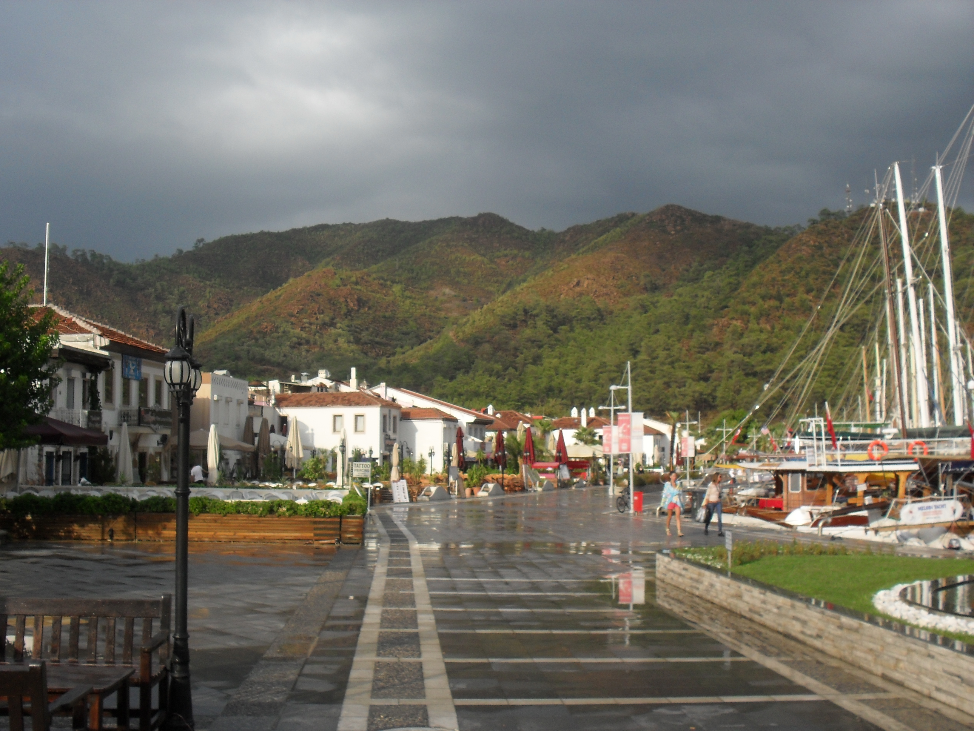 Marmaris, deptak przy nabrzeżu